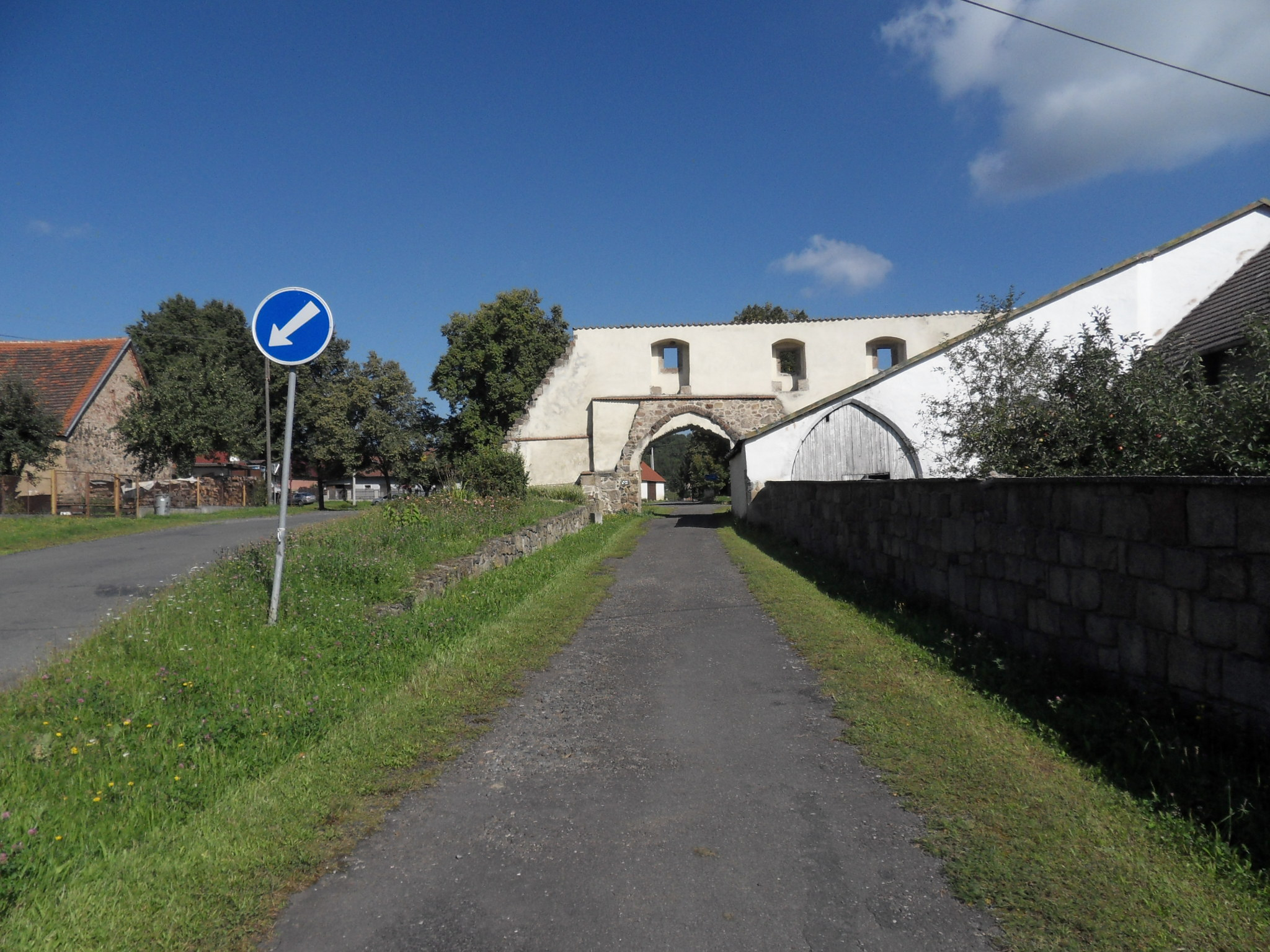 Klášter cisterciáků - fragmenty, obec Klášter u Nepomuka, okr.Plzeň-jih